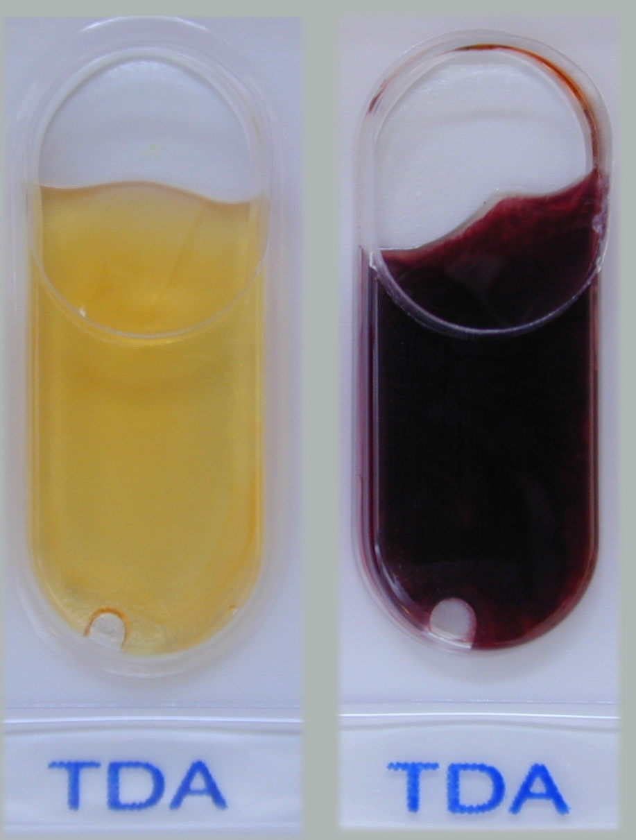 TDA API20E